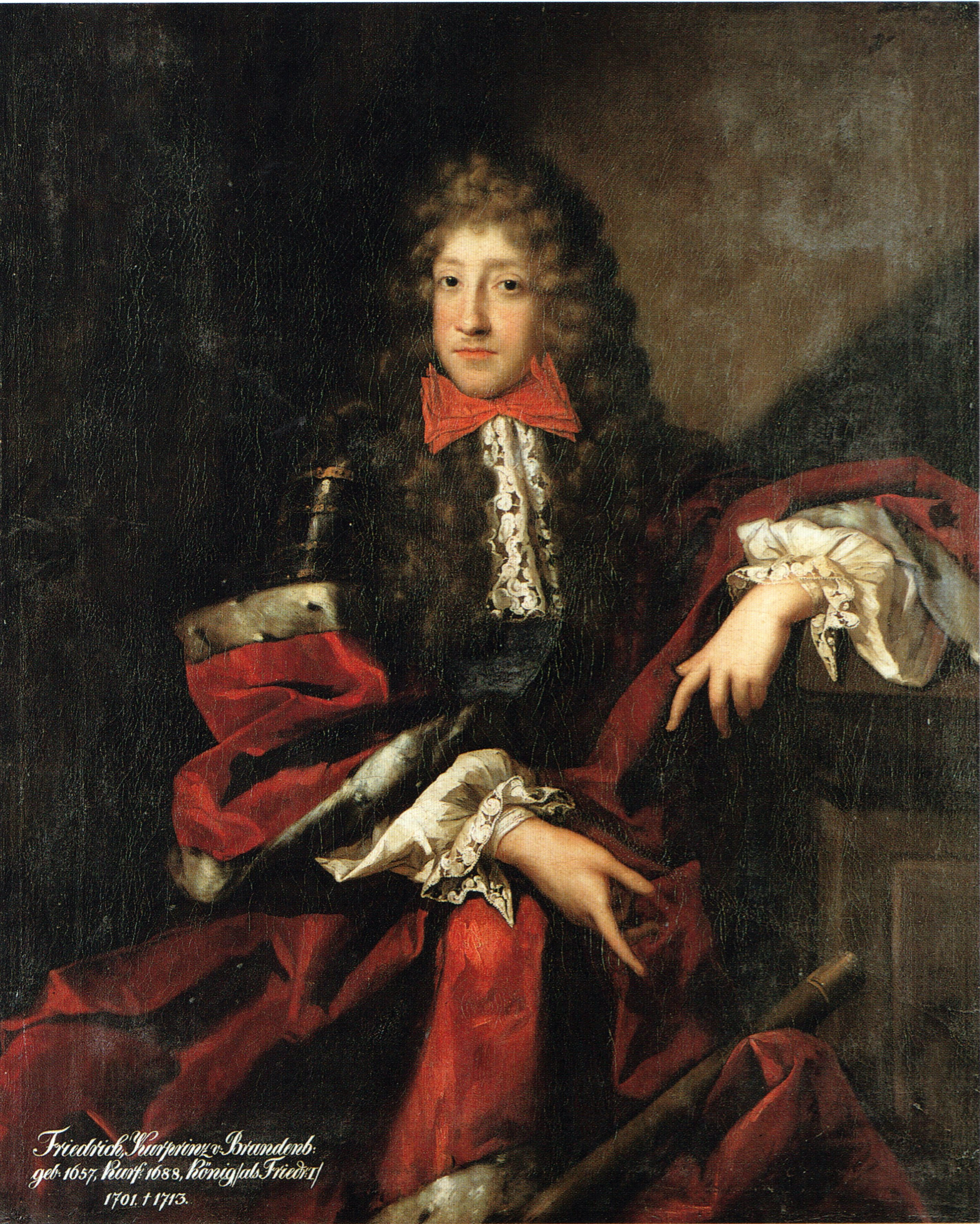 Ölgemälde von Kurprinz Friedrich von Brandenburg-Preußen (1657-1713).